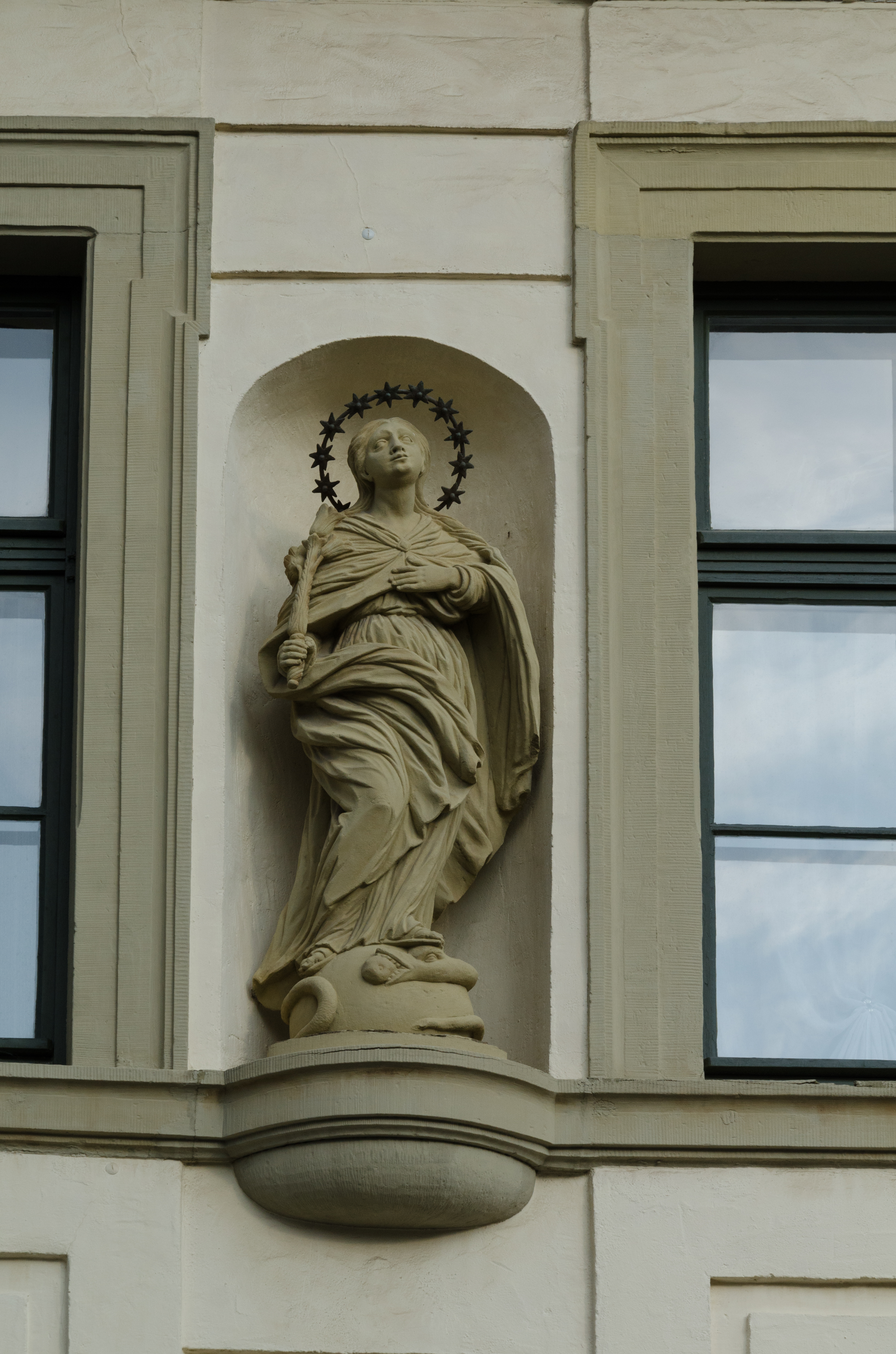 Bad Kissingen, Obere Marktstraße 12, Hausfigur